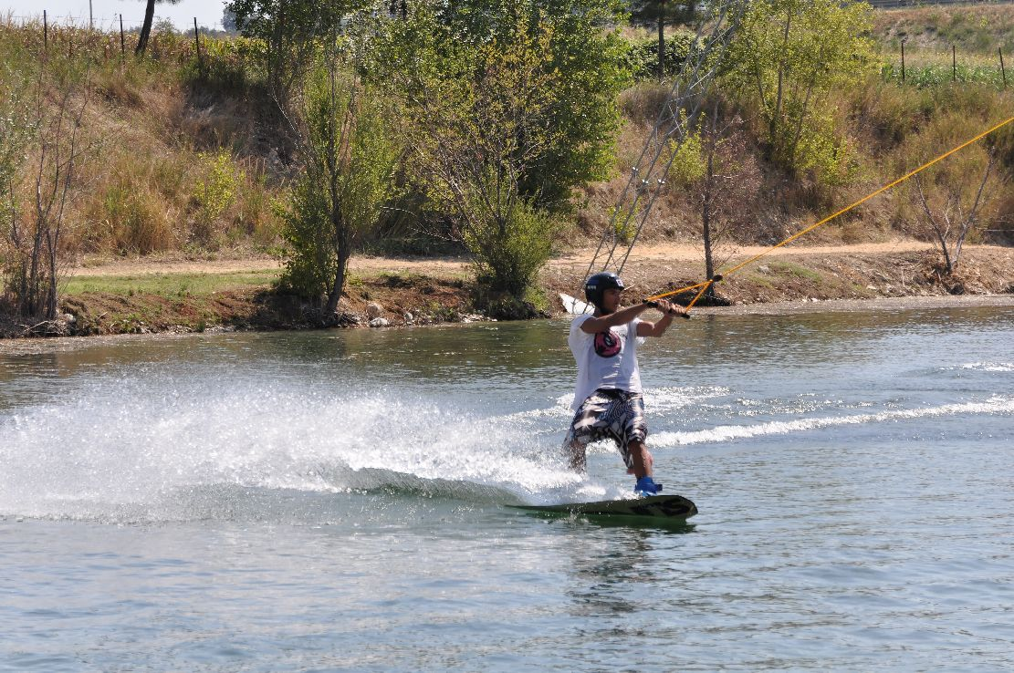 Manoppello Hot-Lake 2012